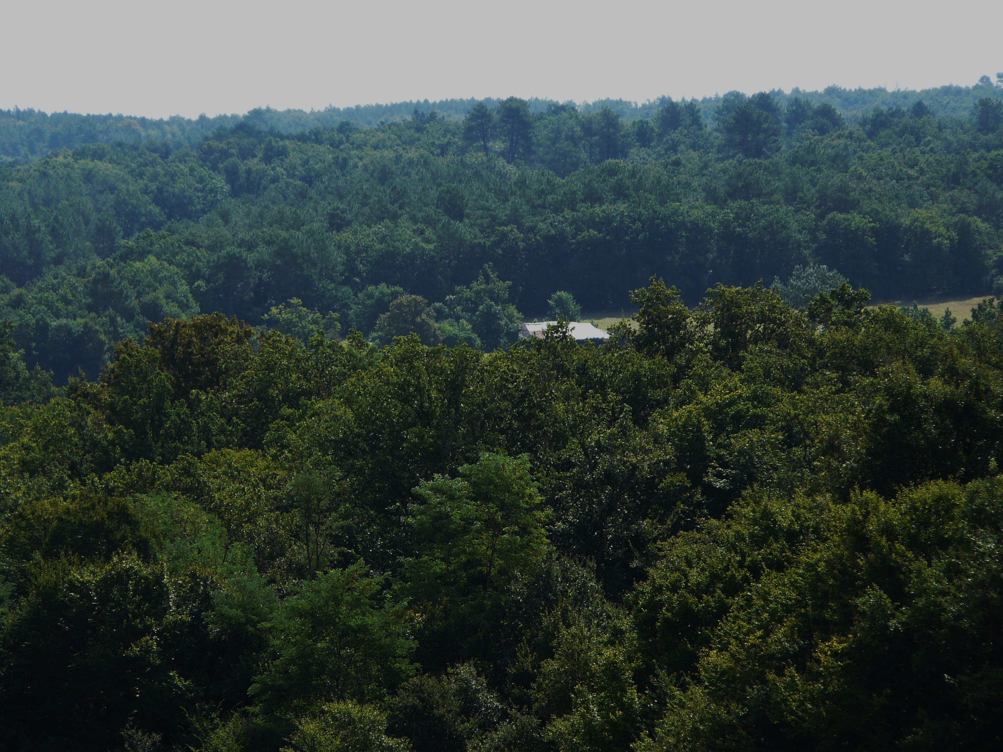 Forêt de la Double, vue depuis Saint-Michel-de-Double, Dordogne, France